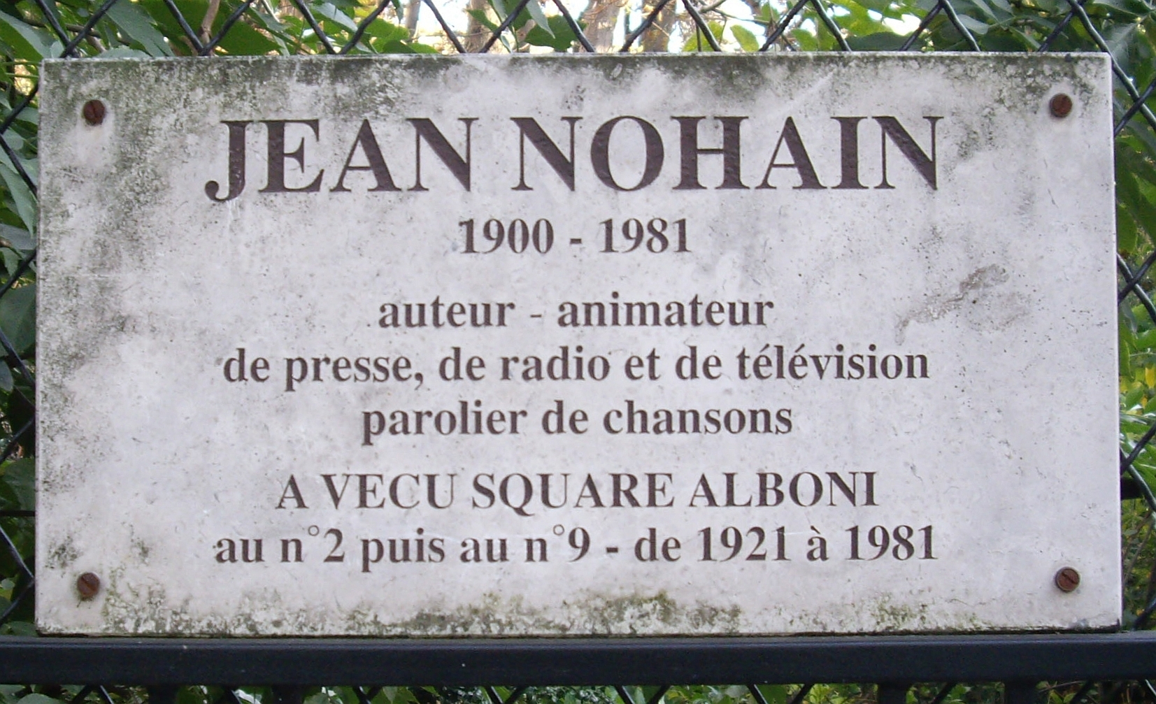 Plaque commémorative, 2 et 9 square Alboni, Paris 16e. « Jean Nohain, 1900-1981, auteur-animateur de presse, de radio et de télévision, parolier de chansons, a vécu square Alboni, au n° 2 puis au n° 9, de 1921 à 1981. »